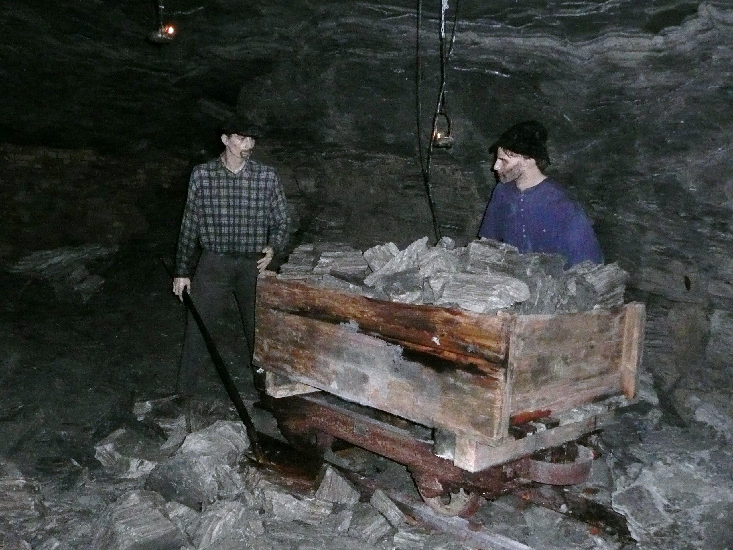 Ausstellung im Gipsmuseum Schleitheim, Kanton Schaffhausen/Schweiz.